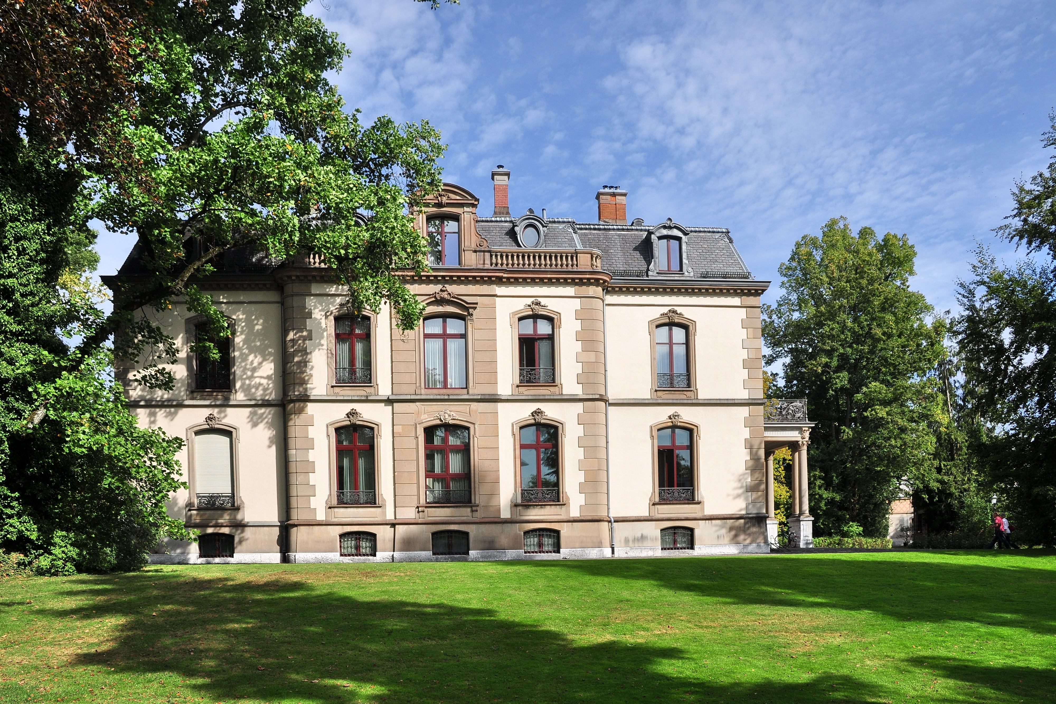 Villa Bühler-Egg sowie Münzkabinett und Antikensammlung, Lindstrasse 8 in Winterthur (Switzerland)